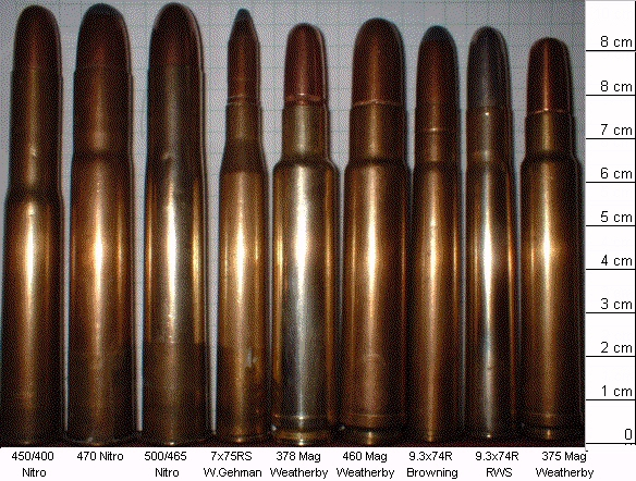 My picture 450/400 Nitro 470 Nitro 500/465 Nitro 7x75RS 378 Mag 460 Mag 9,3x74R 375 Mag